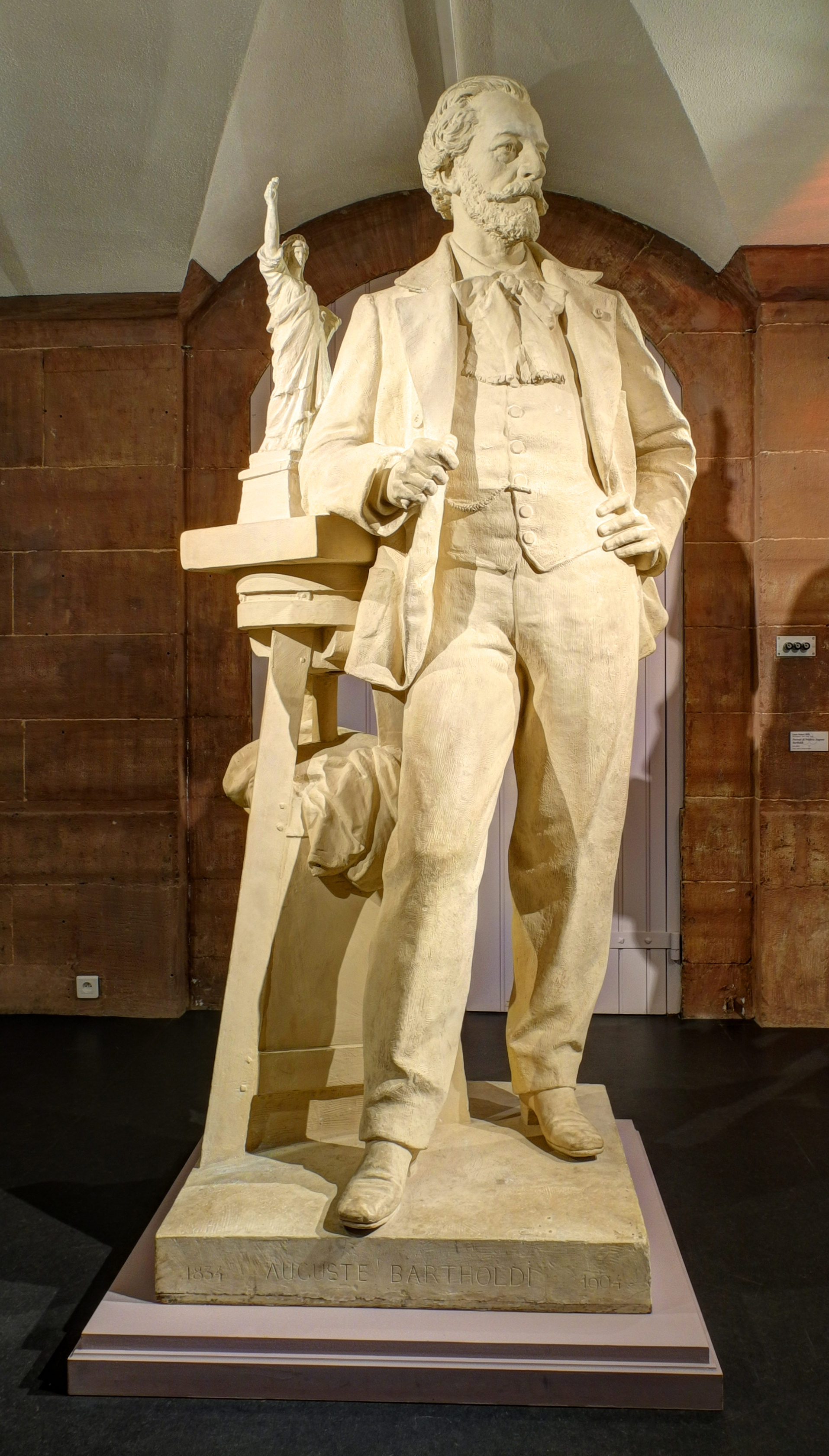 Musée d'Histoire : portrait de Frédéric-Auguste Bartholdi. Louis-Hubert Noël (Rumenghem, 1839 - Paris, 1925). N° inv : 2010.1.3, Musées de Belfort. (HDR).